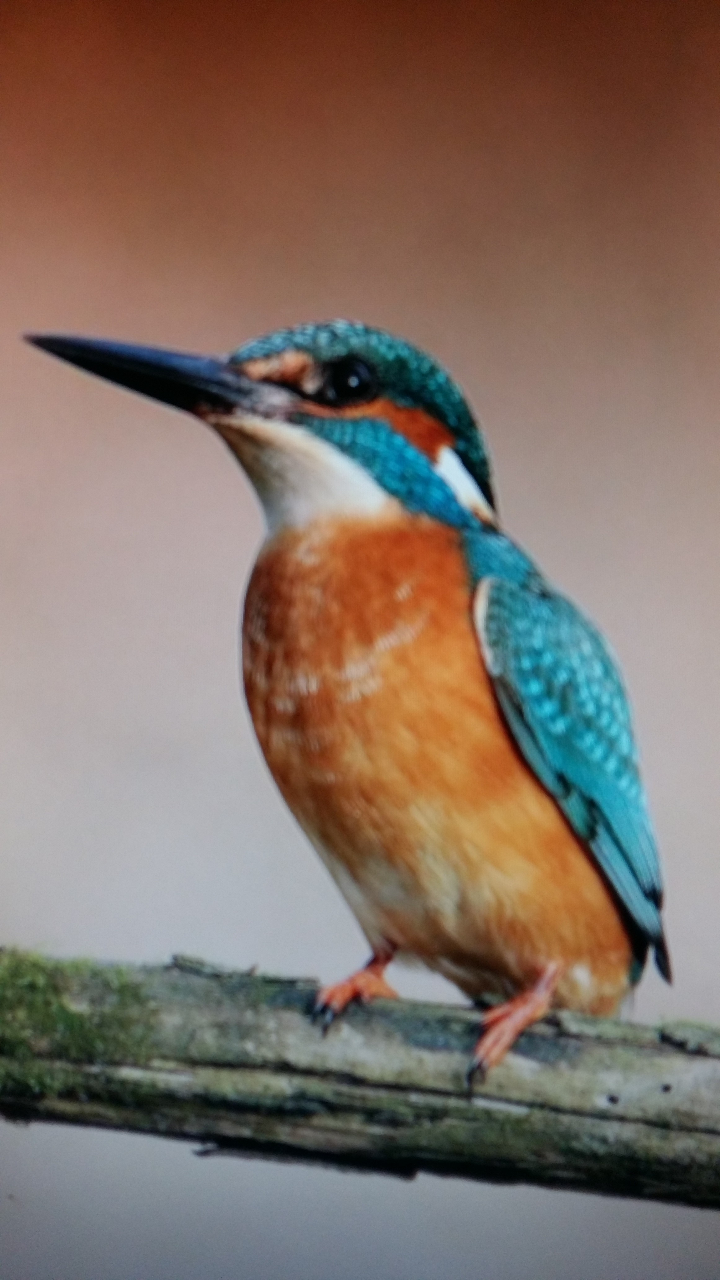 Vodomec